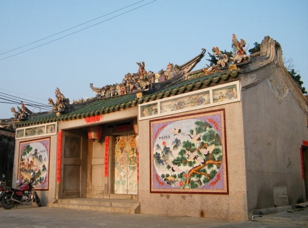 葛洲张氏祠